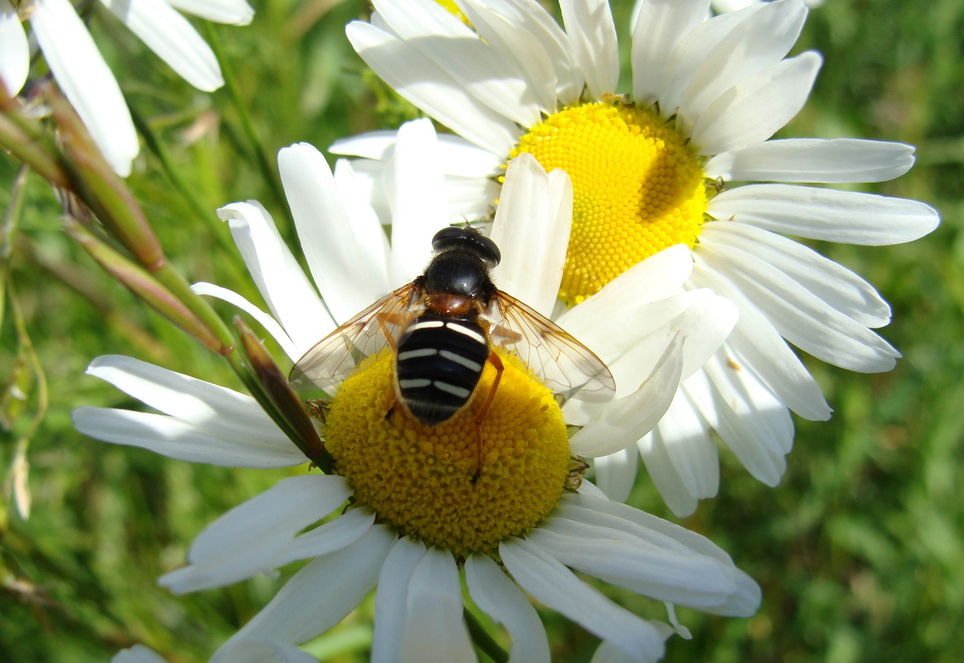 Пчела опыляет ромашки